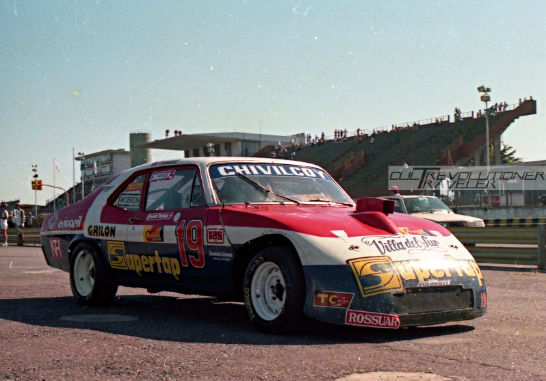 Roberto Urretavizcaya en el autodromo de Bs. As.